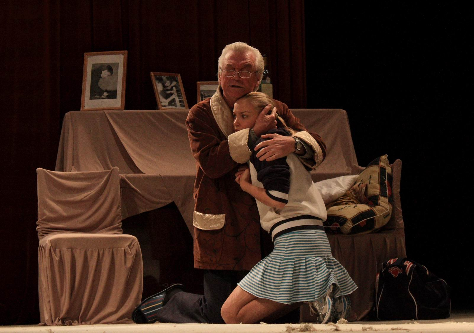 На сцене: Аристарх Евгеньевич Ливанов, Татьяна Альбертовна Арнтгольц.